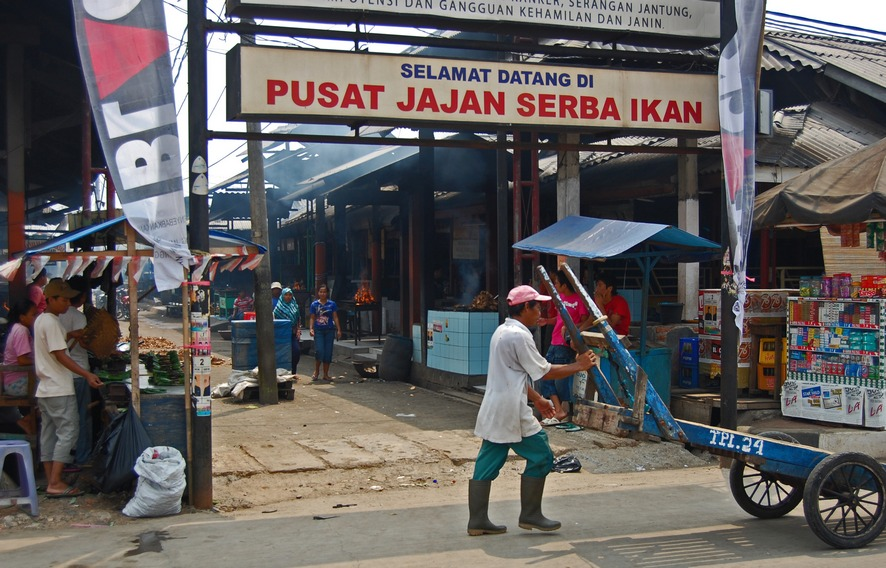 Fish food-court, Muara Angke, Jakarta, Indonesia